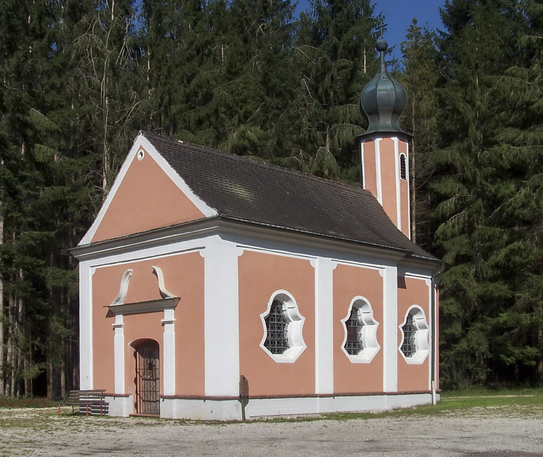 Essenbach, Oberröhrenbach. Kapelle "Zum Hergott auf der Wies". Barocker Bau von 1754; mit Ausstattung.